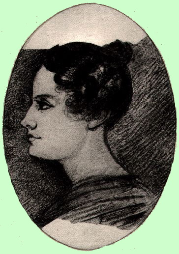 Княгиня М. Н. Волконская. Рисунок З. А. Волконской, сделанный 26–29 декабря 1826 г. в Москве.